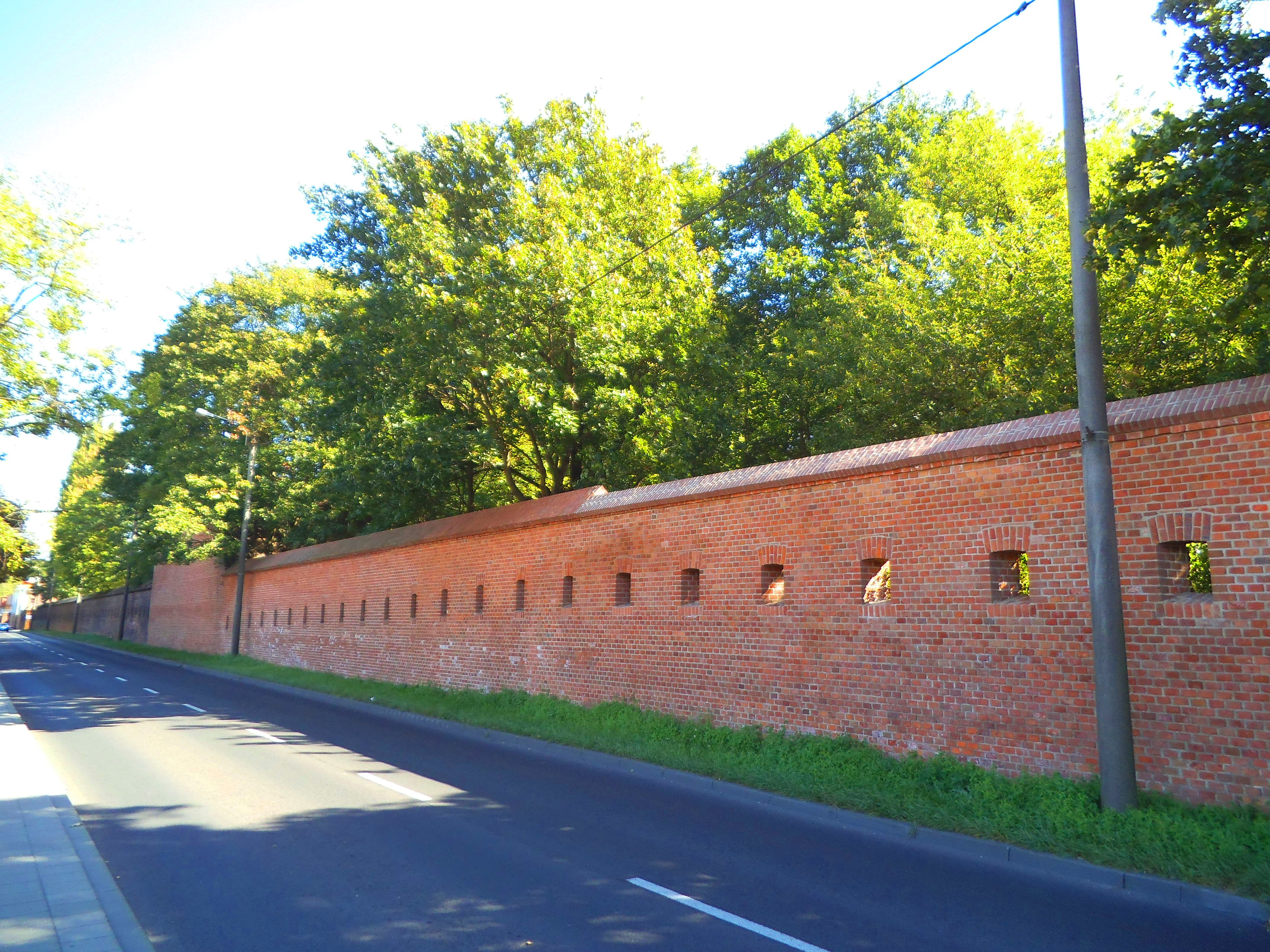 ulica Podgórska w Toruniu